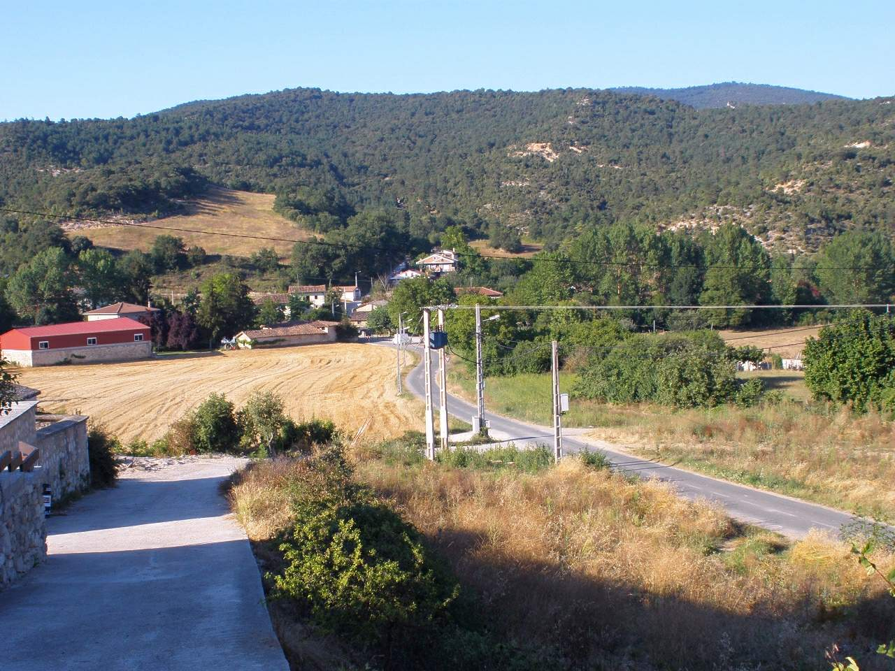 Gurendes (Álava)